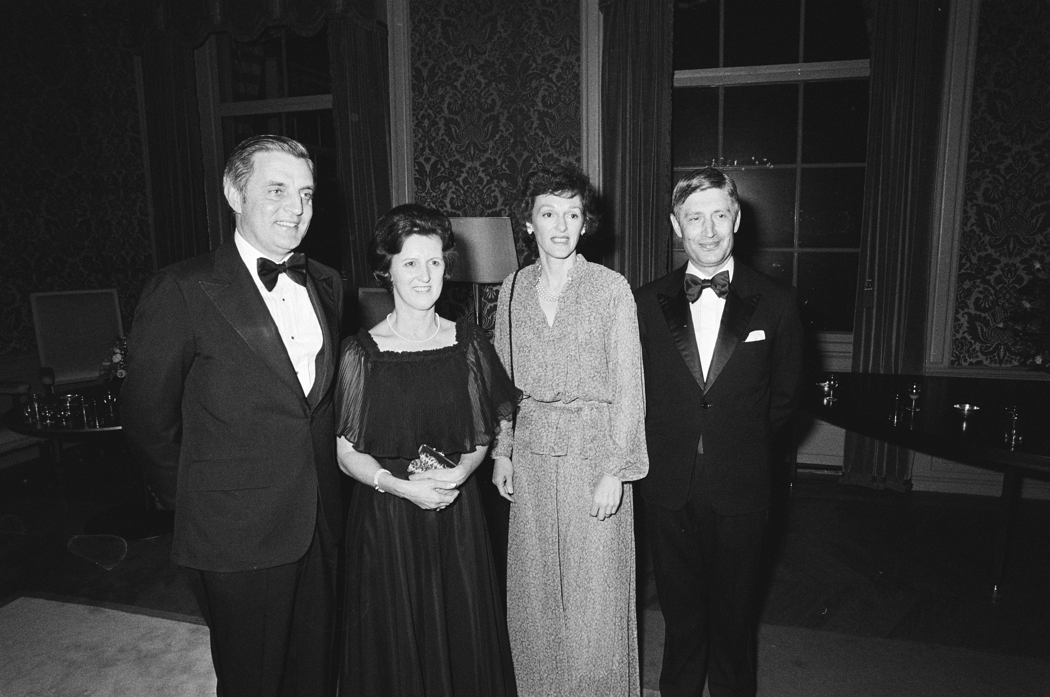 Collectie / Archief : Fotocollectie Anefo Reportage / Serie : Amerika's vice president Walter Mondale een dag in Nederland Beschrijving : Mondale, van Agt en echtgenotes Datum : 21 april 1979 Trefwoorden : groepsportretten, maaltijden, politici, premiers Persoonsnaam : Agt, Dries van, Agt-Krekelberg, Eugenie van, Klaauw, Chris van der, Modale, Joan, Mondale, Walter Fotograaf : Bogaerts, Rob / Anefo Auteursrechthebbende : Nationaal Archief Materiaalsoort : Negatief (zwart/wit) Nummer archiefinventaris : bekijk toegang 2.24.01.05 Bestanddeelnummer : 930-2251